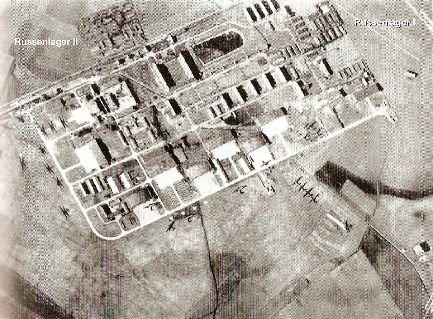 Luftaufnahme der US-Air-Force vom Messerschmitt-Werk Obertraubling von Sommer 1943. Das fast vollständig ausgebaute Werksgelände war seiner Zeit ohne Bombenschäden. Die tatsächliche N-S-Ausrichtung des Geländes ist ca. 40° nach Westen gedreht.